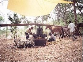 Molienda donde se muele caña